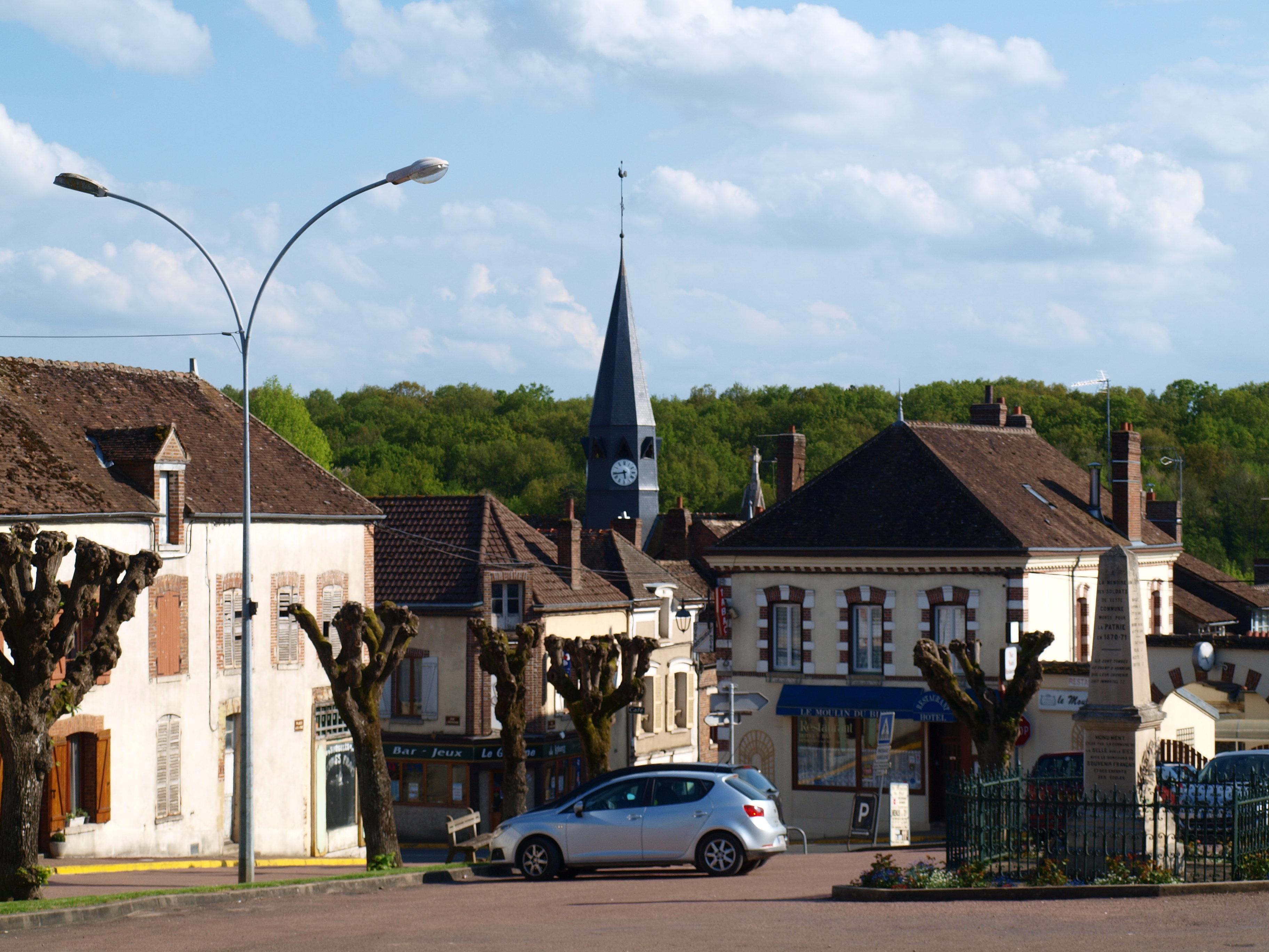 La Selle-sur-le-Bied (Loiret, France)